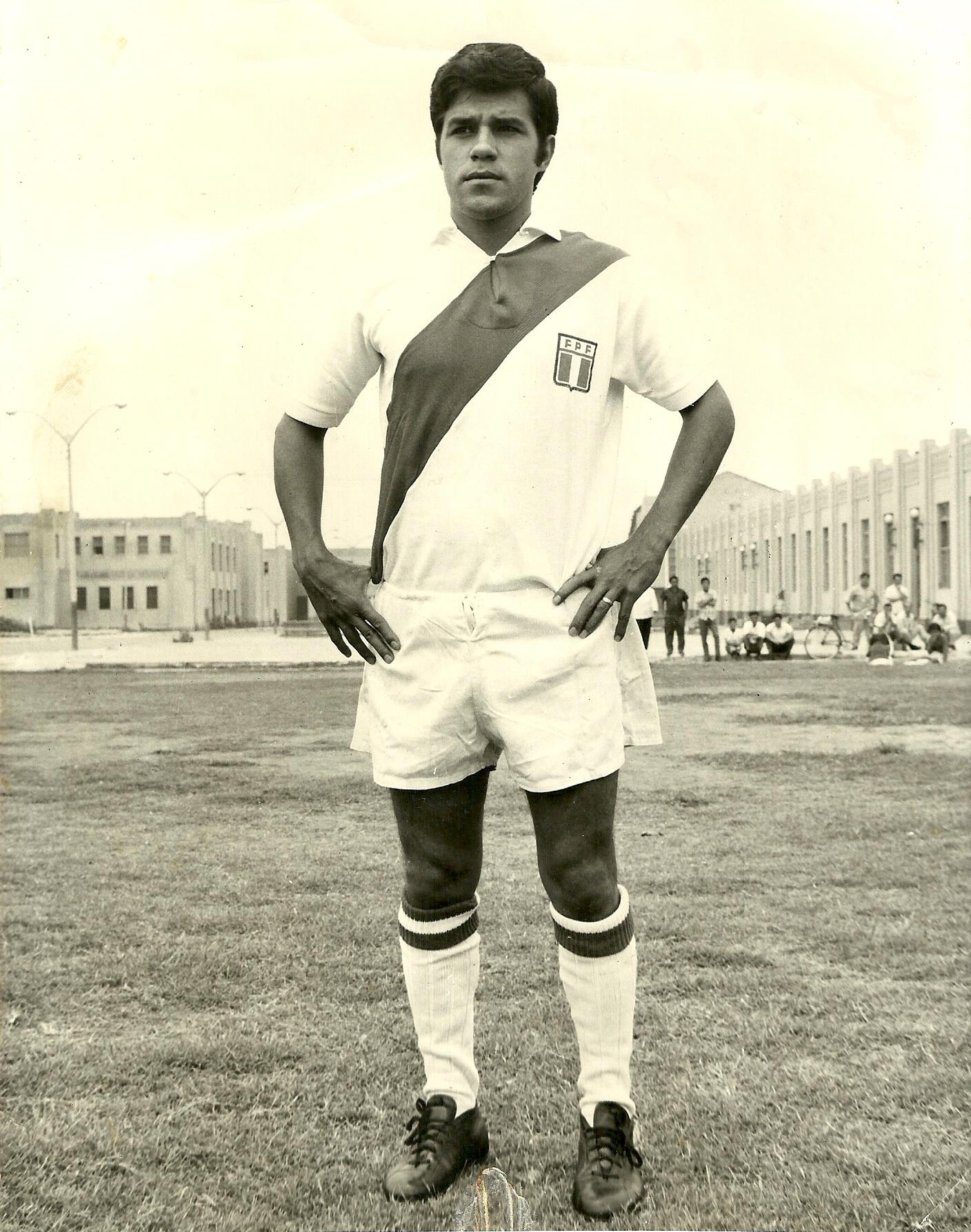 Seleccion de Perù 1970